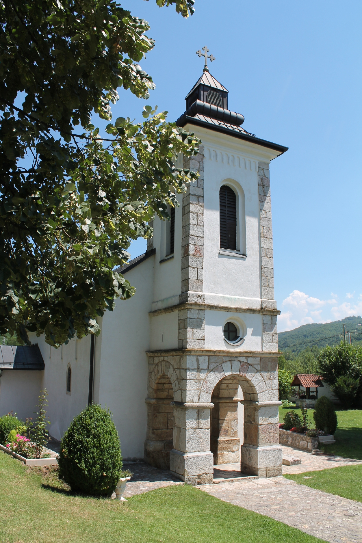 This image was uploaded as part of Trace of Soul 2016. Crkva posvecena Svetom Djordju u Sopotnici.